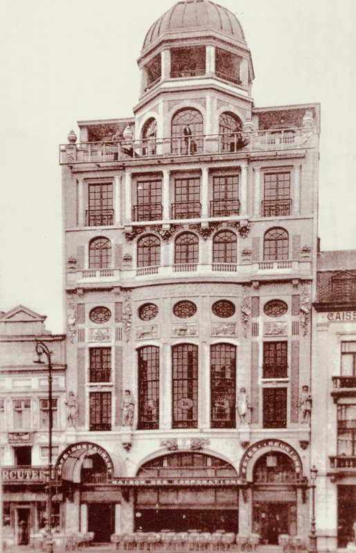 Maison des corporations Charleroi - Galeries Kakone